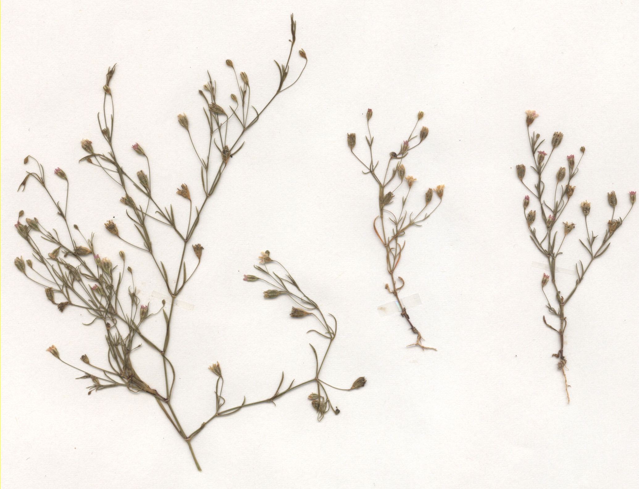 Gypsophila muralis, eigener Herbarbeleg von 1983, Unterfranken